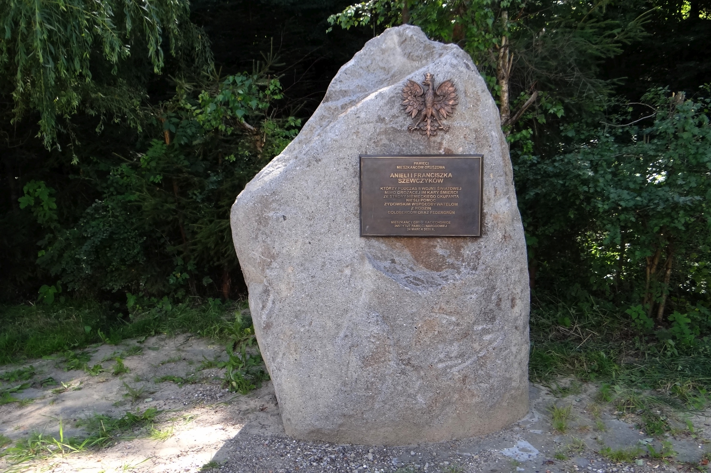 Gruszów (powiat myślenicki). Pomnik zamordowanych przez hitlerowców